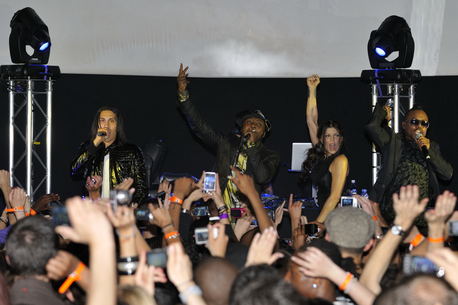 Les Black Eyed Peas en concert privé au VIP Room Paris. avec will.i.am, apl.de.ap, Taboo et Fergie